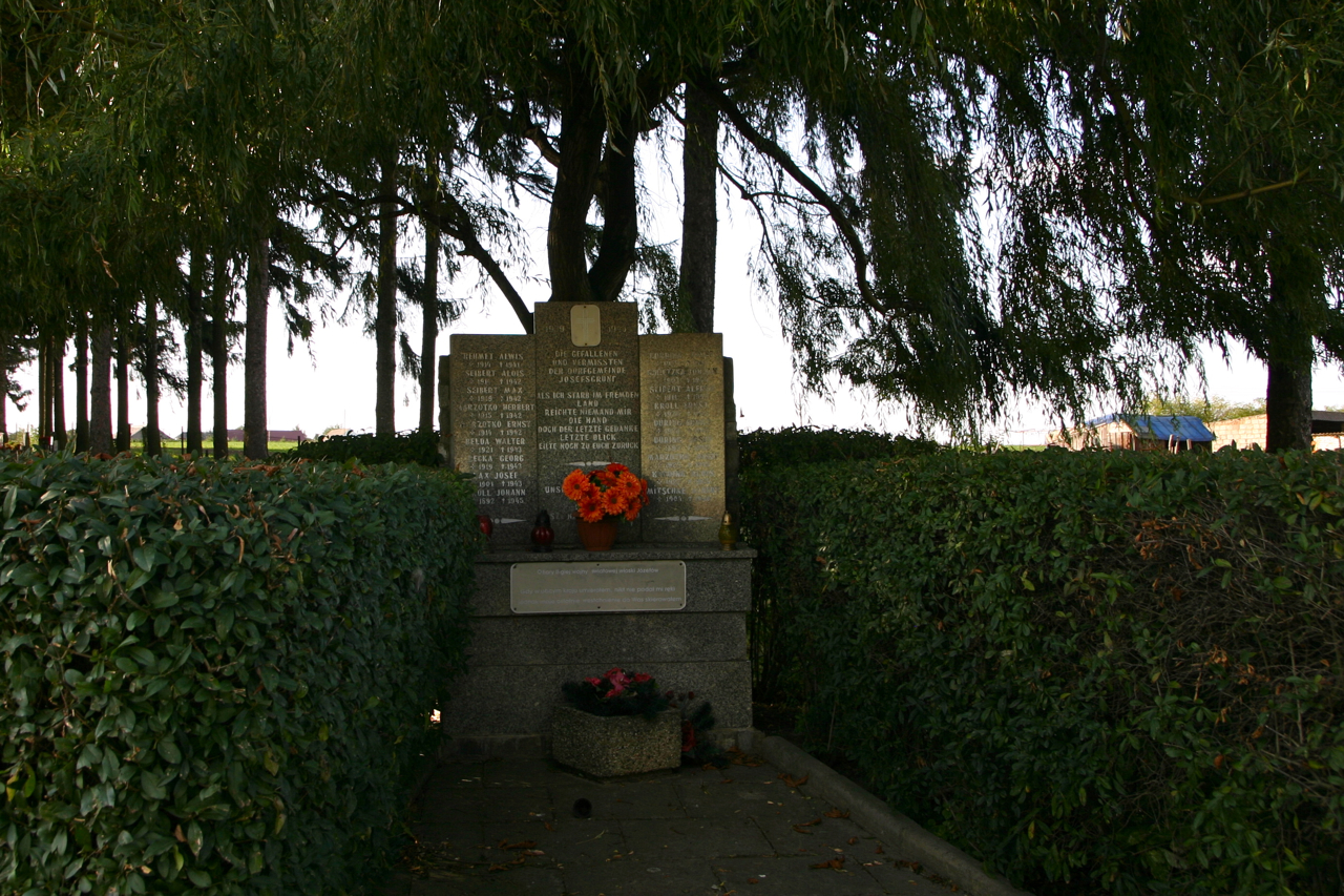 Józefów (dodatkowa nazwa w j. niem. Josefsgrund) – wieś w Polsce położona w województwie opolskim, w powiecie prudnickim, w gminie Biała.